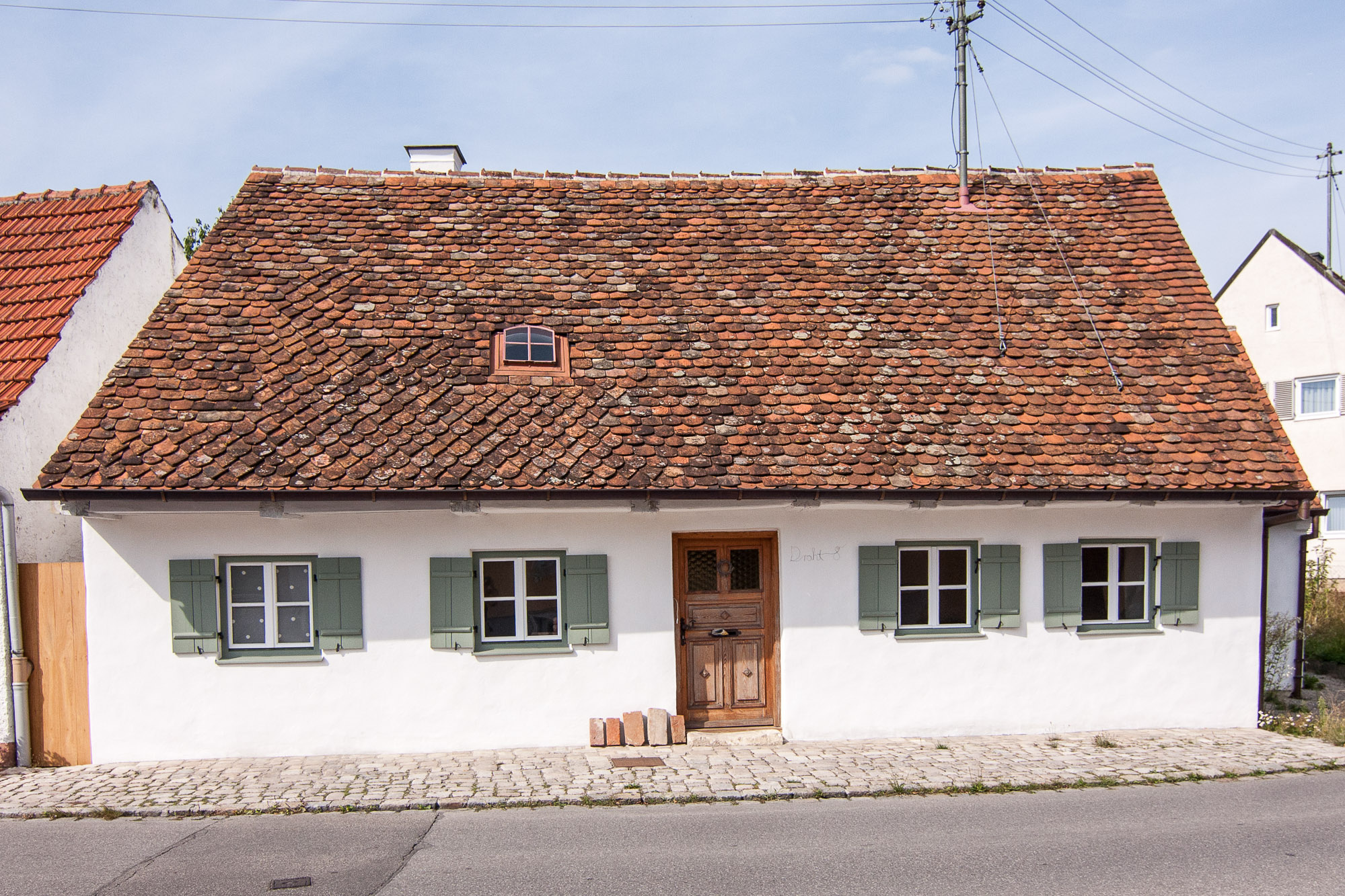 Ehem. Kleinbauernhaus; mit Greddach und Stüberlvorbau, Anfang 18. JahrhundertThis is a photograph of an architectural monument.